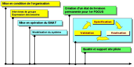 CycleRAD